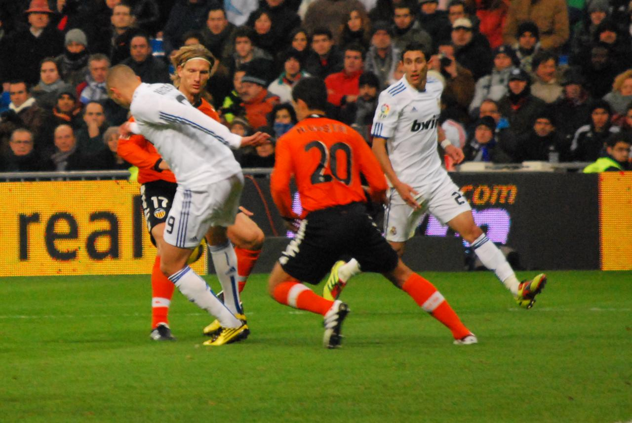 La Liga 4 de Diciembre 2010 Real Madrid 2 - Valencia 0